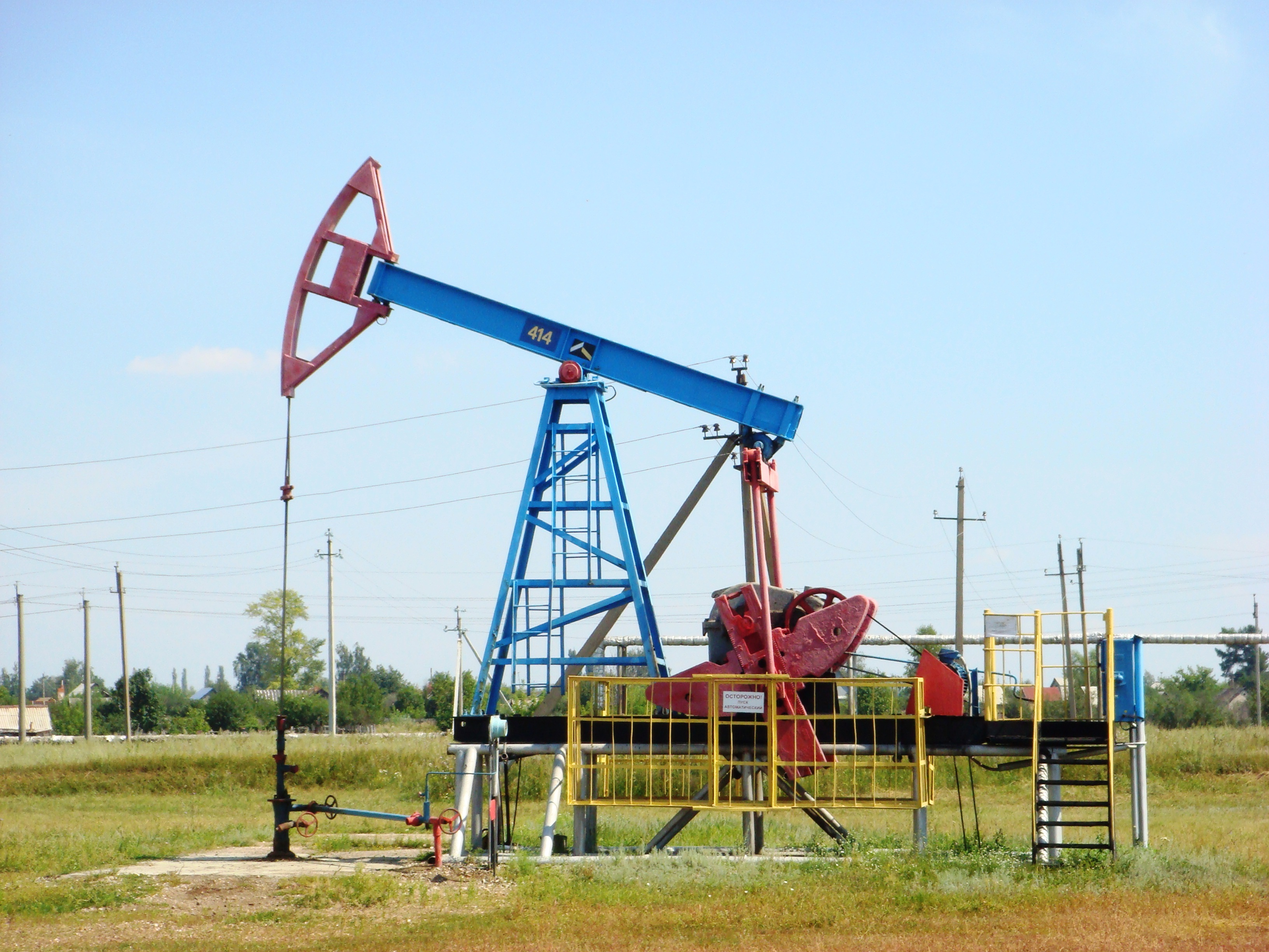 Станок-качалка в городе Ишимбае (возле микрорайона Перегонного), напротив Скважины № 702